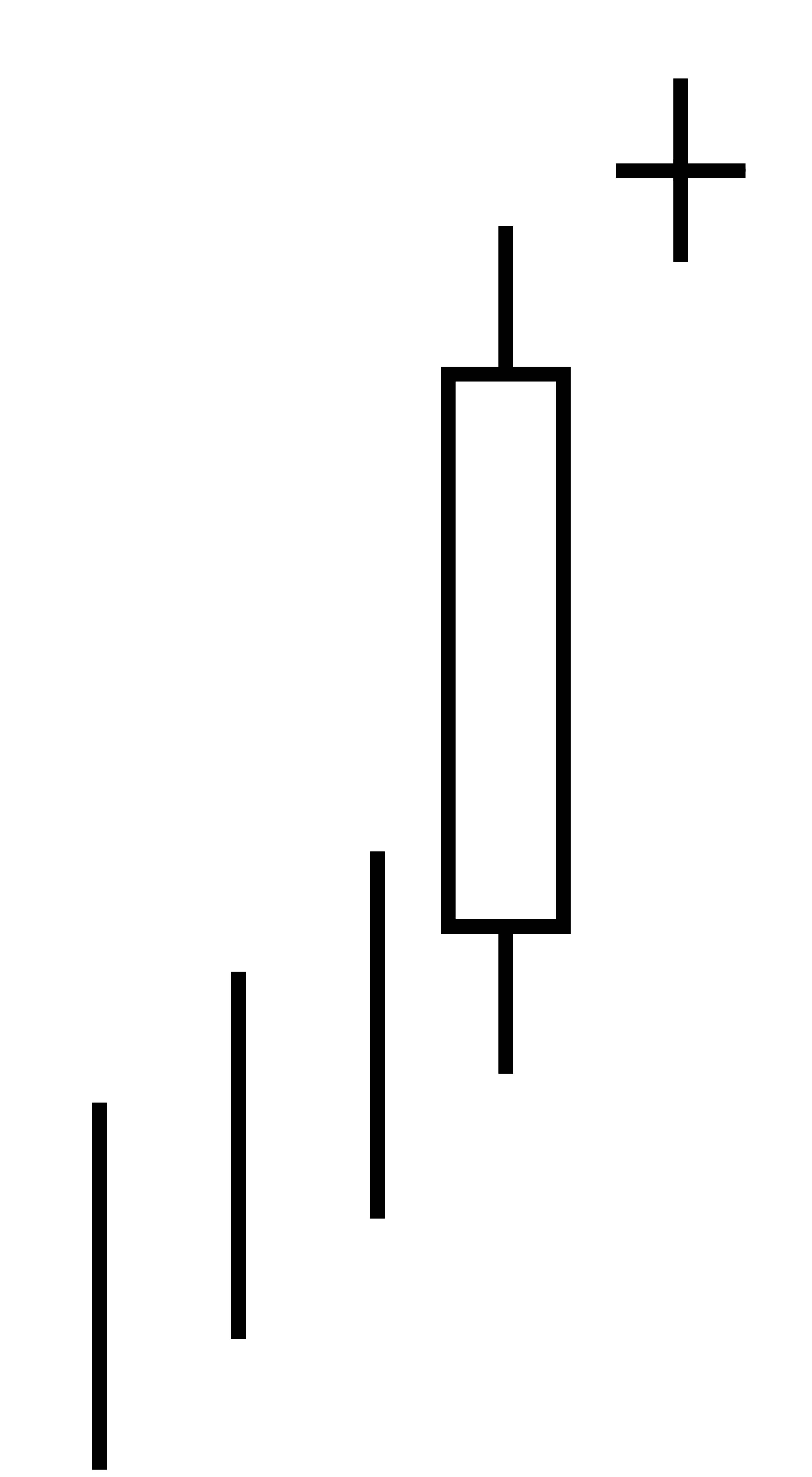 Doji Star